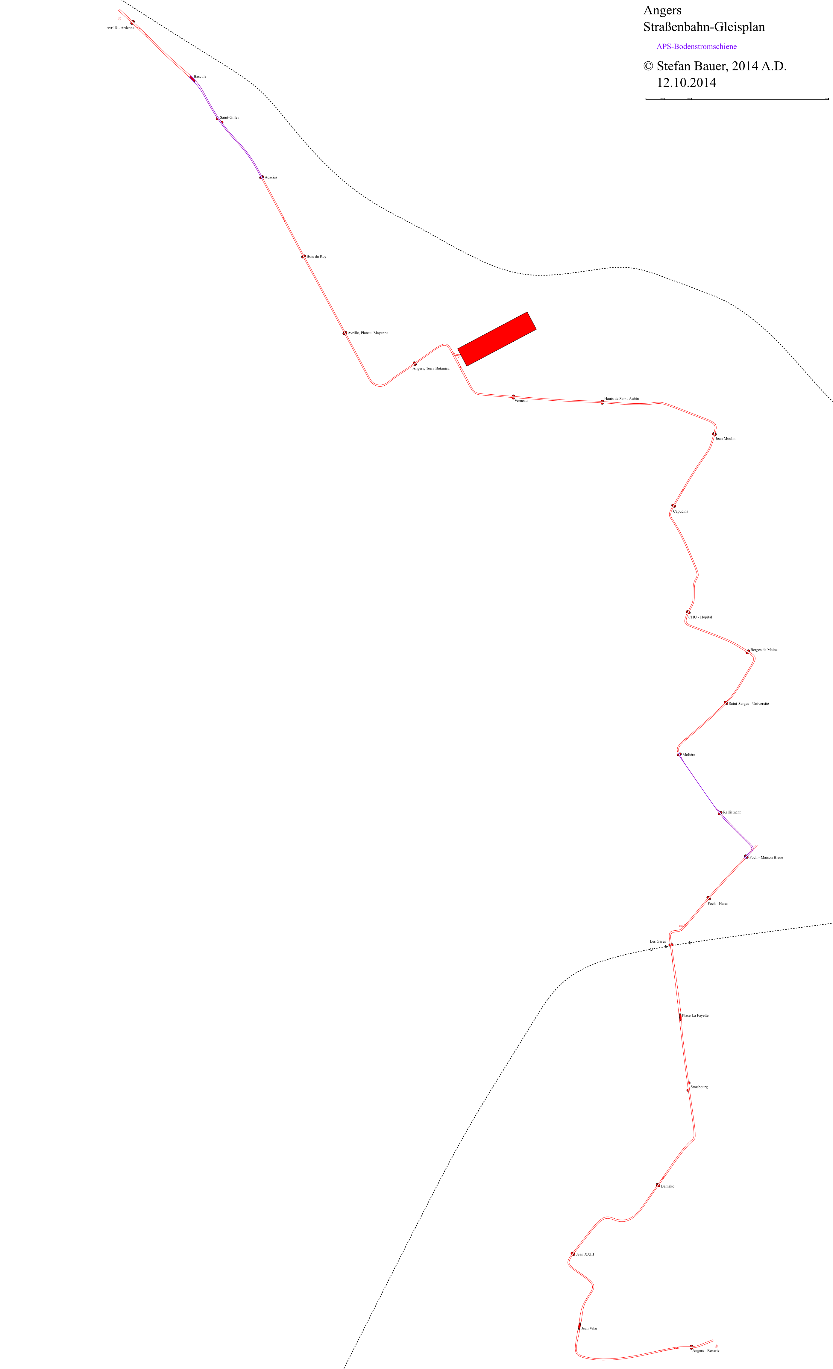 Plan des voies du réseau des tramways d'Angers 2014